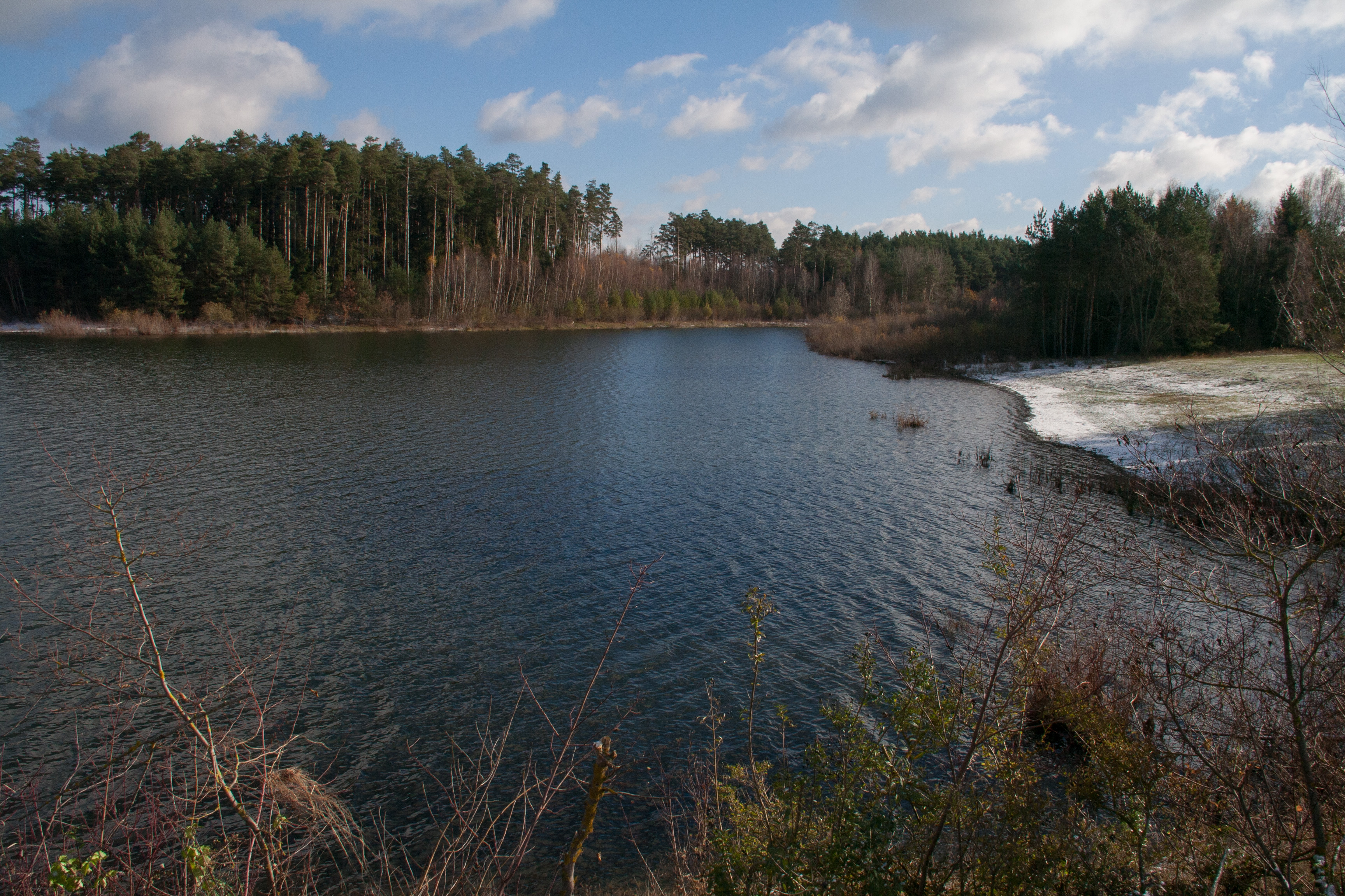 Kleiner Brombachsee, Naturschutzgebiet Grafenmühle